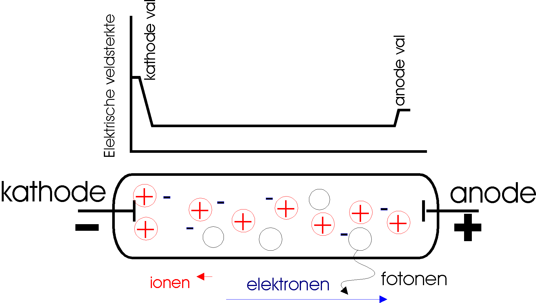 schematische voorstelling van gasontlading in een gasontladingsbuis